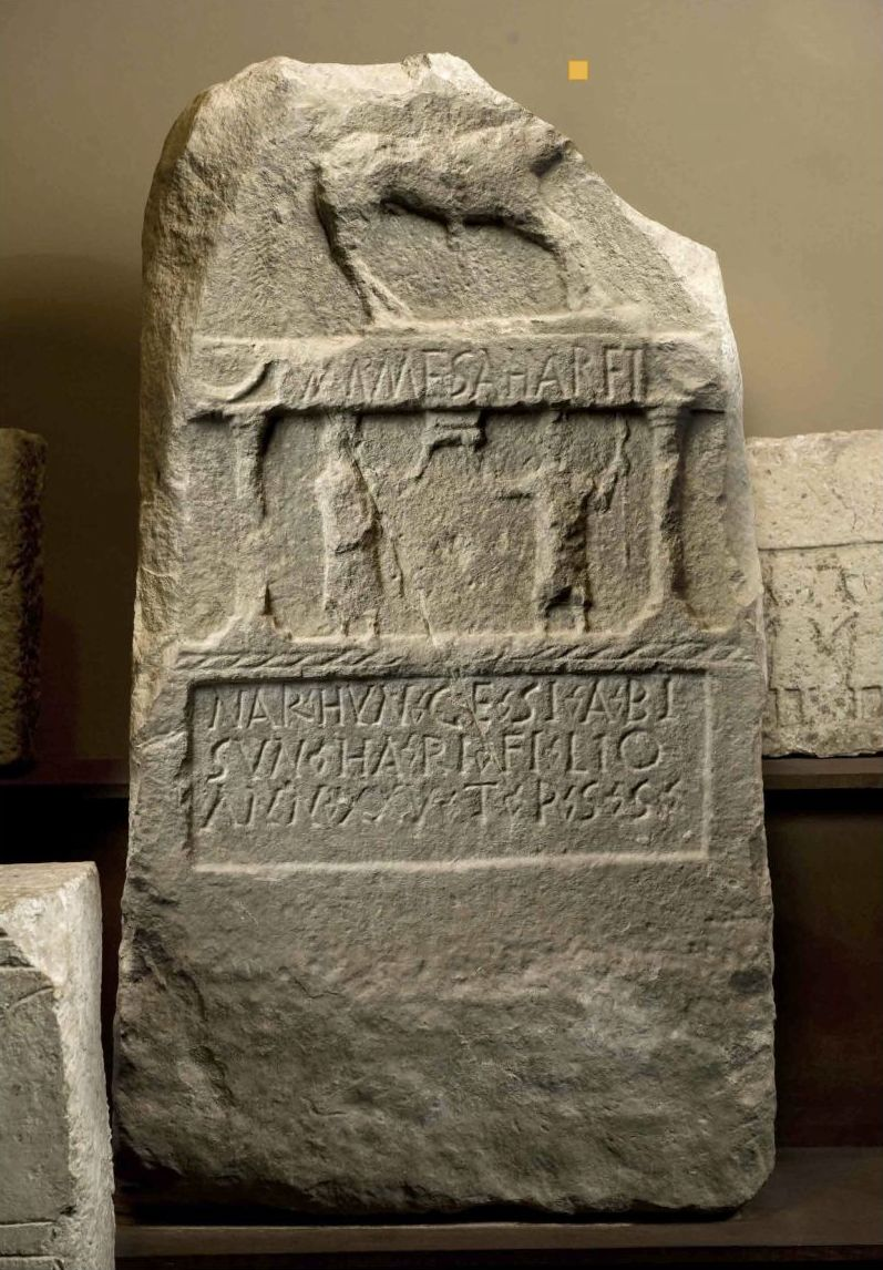 Euskarazko izenak dituen erromatar garaiko idazkuna, Nafarroako Lergan aurkitua.